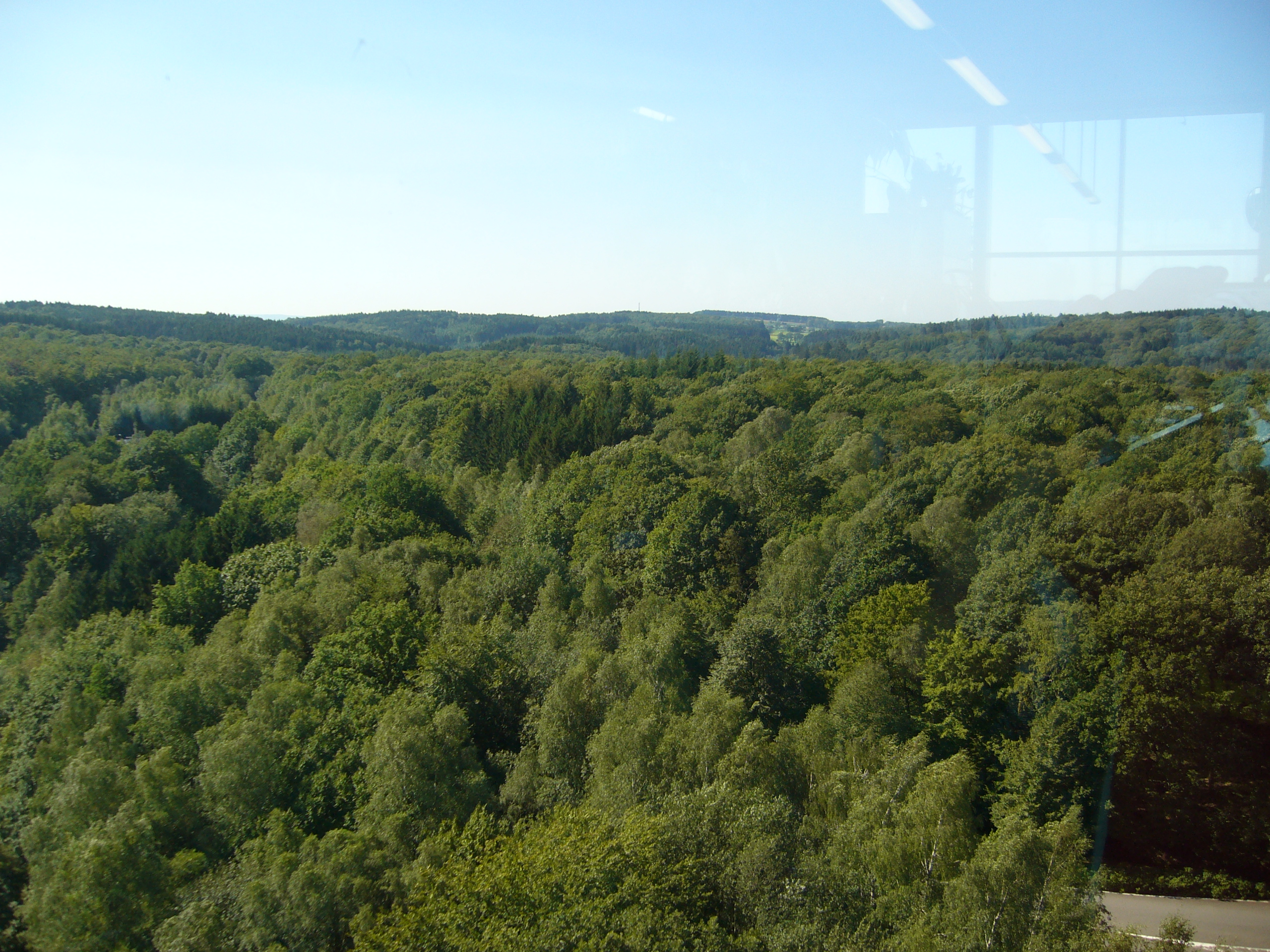 vue sur le Hertogenwald, de la tour panoramique près du barrage de la Gileppe